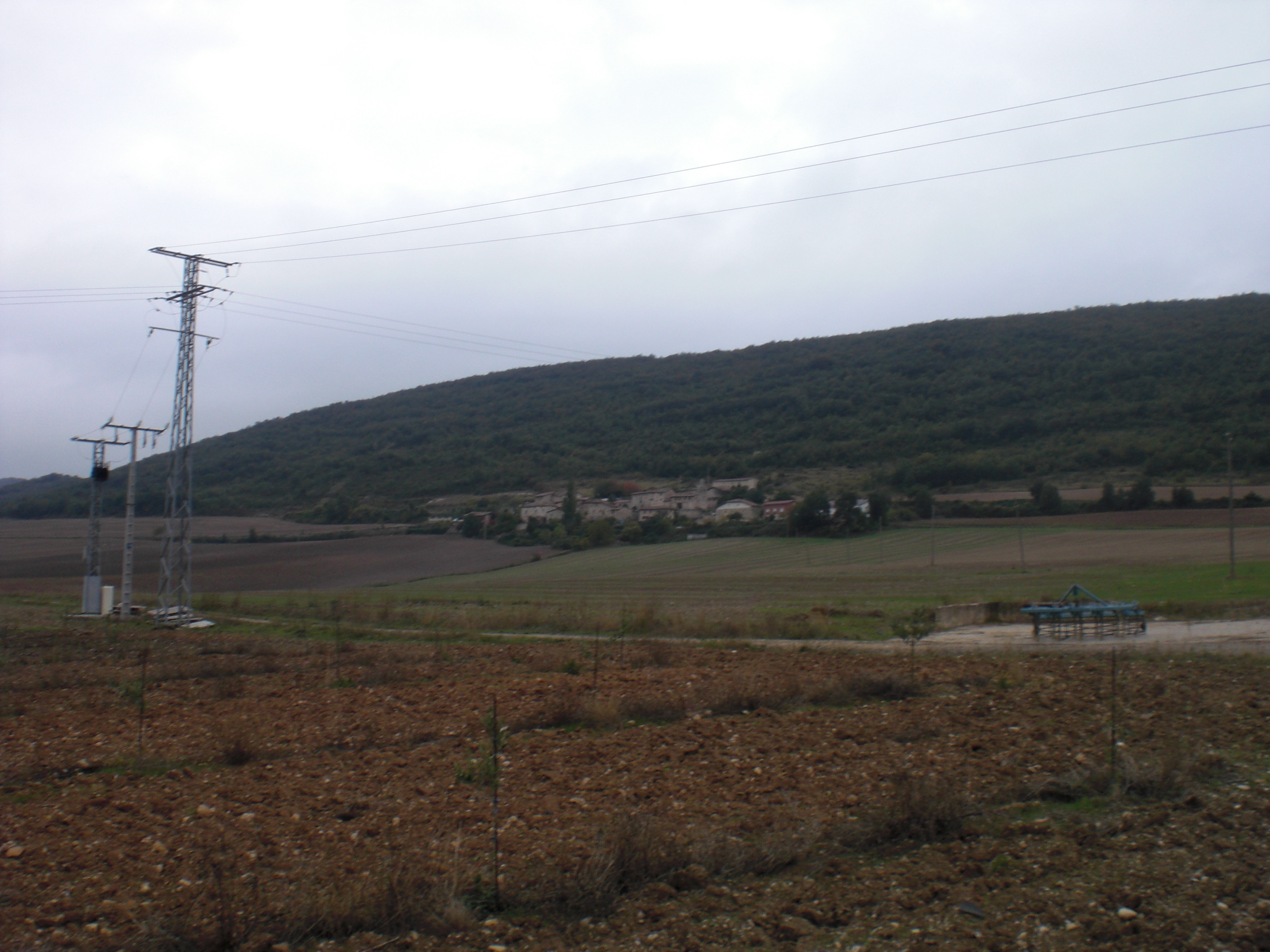 Tobera, Santurdetik ikusita.